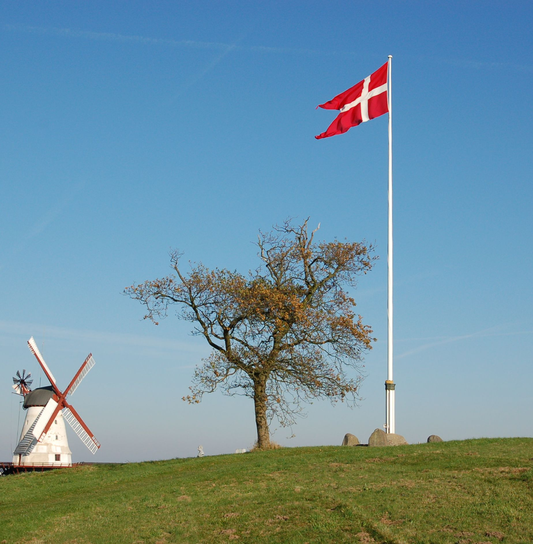 Dybbøl National Memorial, Denmark